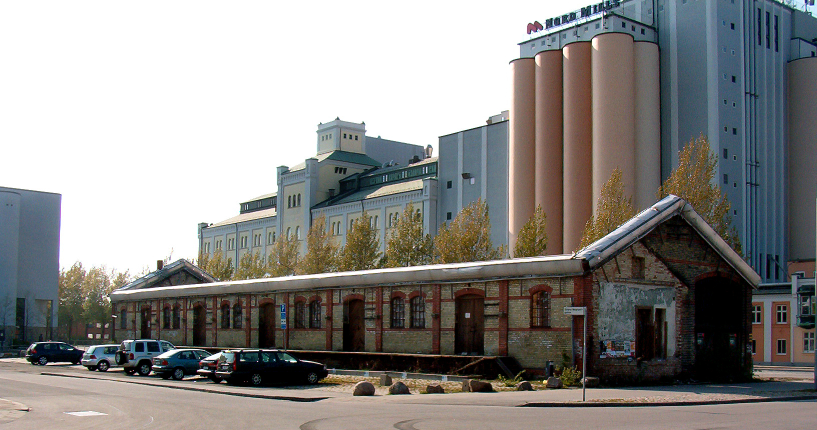 Malmö